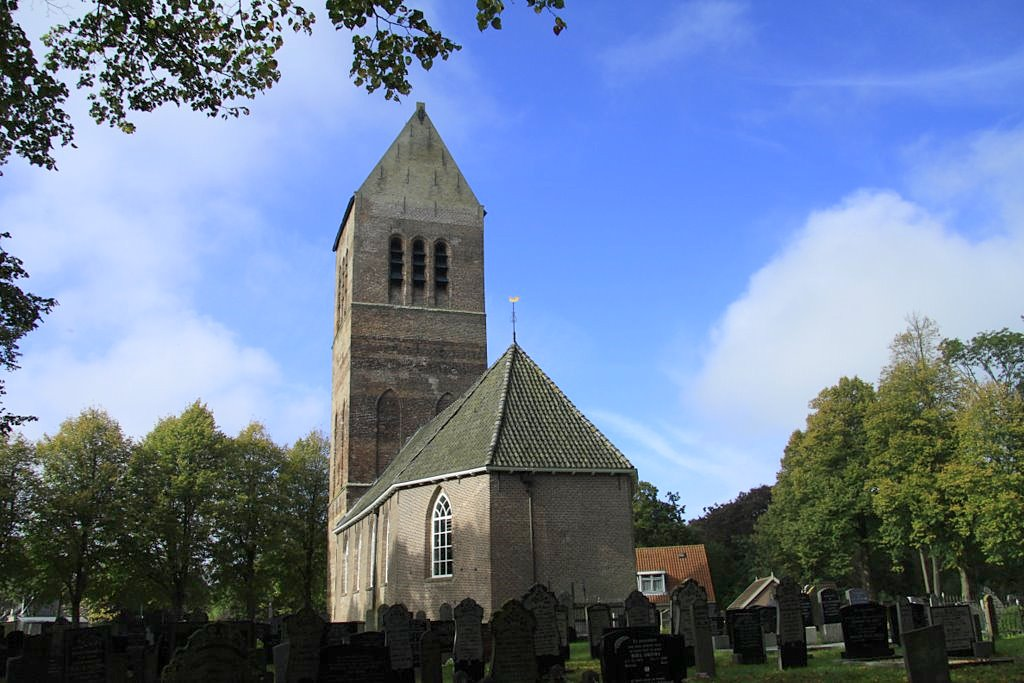 De kerk van Wijckel heeft wel een zeer stoere toren ook deze toren is al van heel ver te zien.